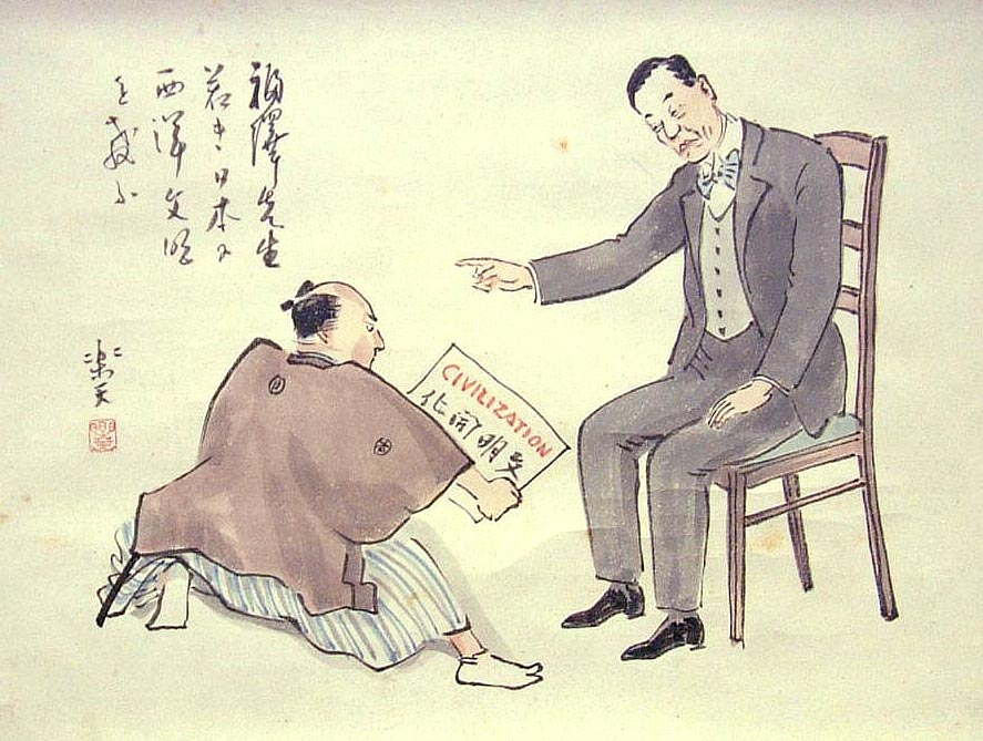 Вчитель Фукудзава навчає західній цивілізацію молоду Японію. Бібліотека університету Васеда